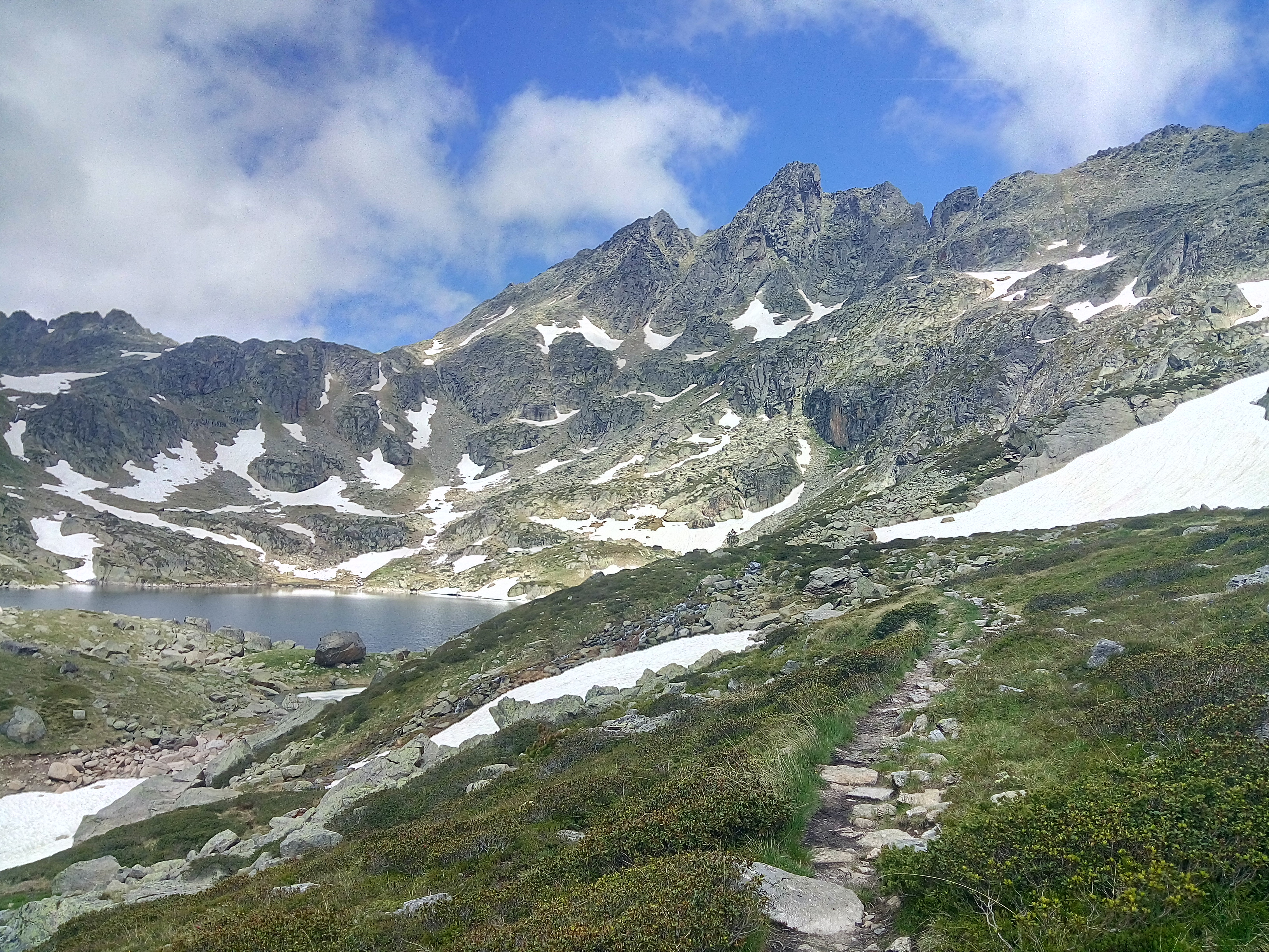 Vista des de prop del Refugi de Juclar